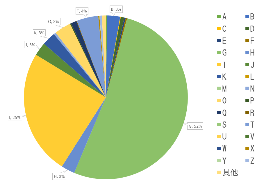 图表为福州第三中学图书馆借书库按类分析。图表按照中国图书馆分类法分类。 统计时间：2004年05月30日。 数据来源： 中国WEB信息博物馆存档： 分析数据：A(.275027502750275%) B(2.53025302530253%) C(.11001100110011%) D(.715071507150715%) E(.275027502750275%) F(.275027502750275%) G(52.1452145214521%) H(2.69526952695269%) I(24.6974697469747%) J(2.64026402640264%) K(2.69526952695269%) L(0%) M(0%) N(.44004400440044%) O(3.3003300330033%) P(.22002200220022%) Q(1.1001100110011%) R(.11001100110011%) S(0%) T(4.29042904290429%) U(0%) V(0%) W(0%) X(.22002200220022%) Y(.055005500550055%) Z(.44004400440044%) 其他(.77007700770077%)